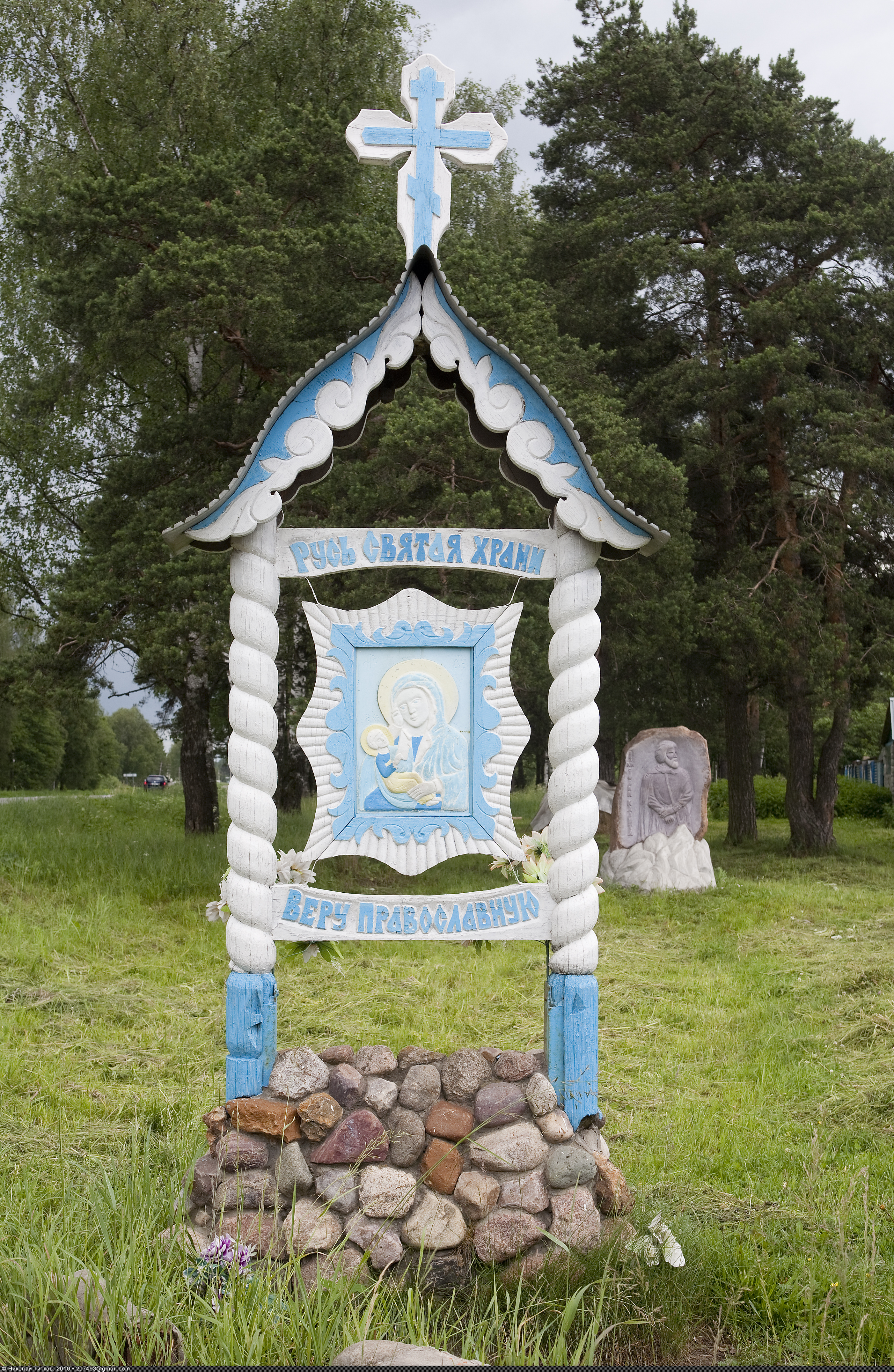 Родник, святой колодец архистратига Михаила на трассе Р-110 у деревни Протасово (Московская область, Щёлковский район).